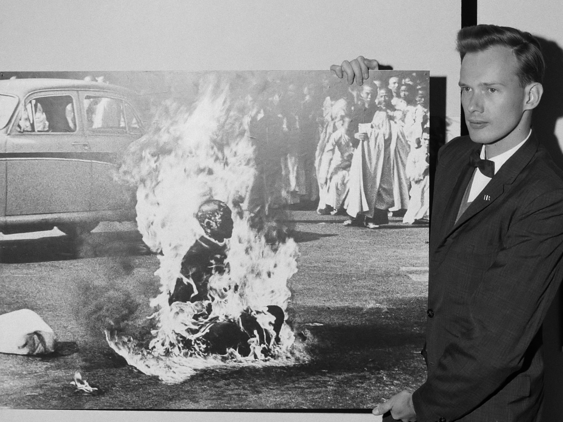 World Press Photo 1963 . De winnaar van hoofdprijs Malcolm W. Brown met foto 13 december 1963